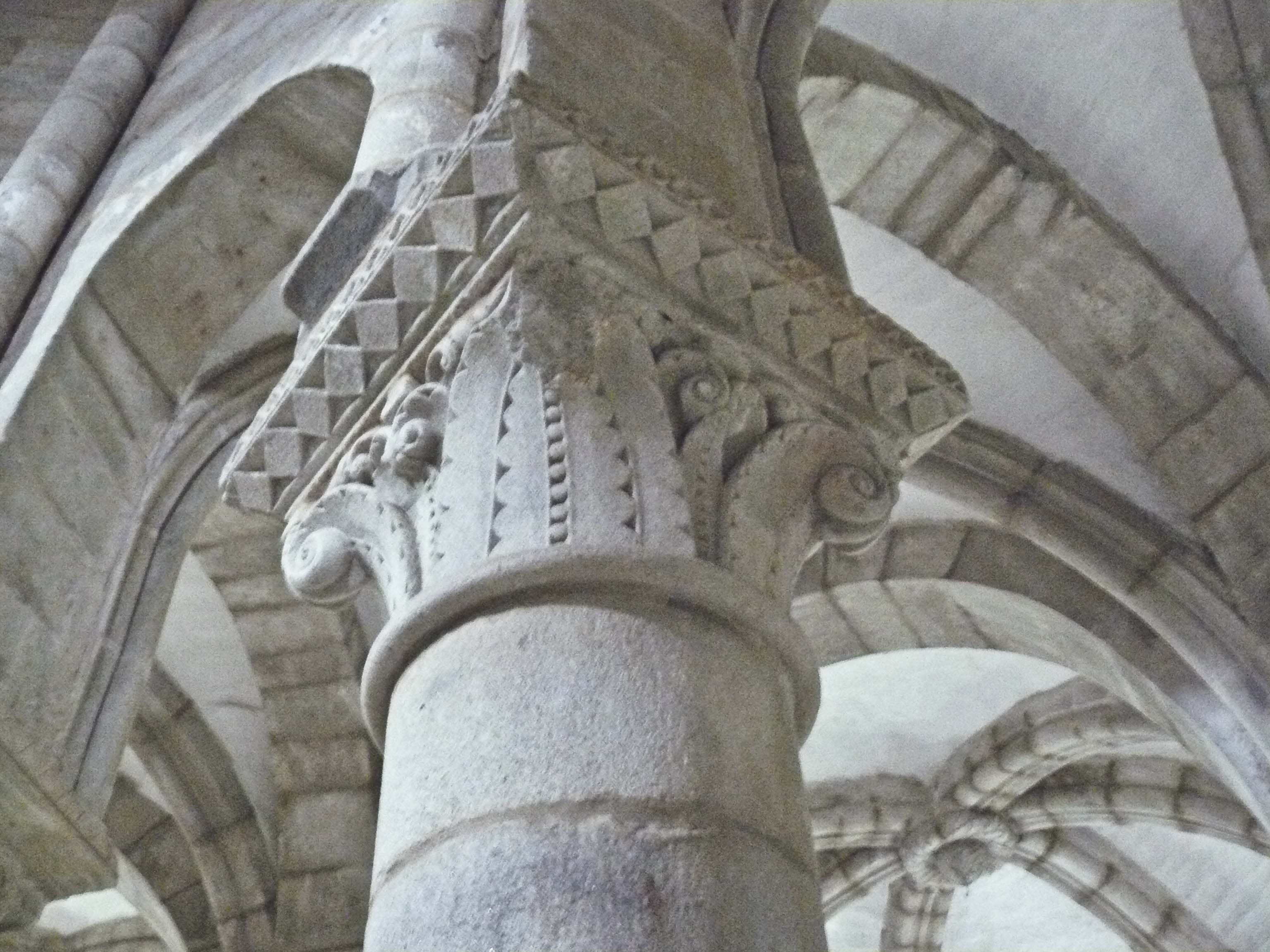 Capitel do Monasterio de Carboeiro